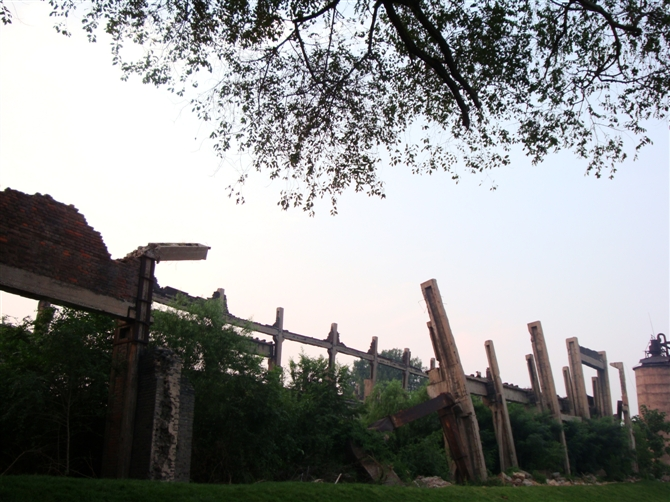 中文（中国大陆）: 唐山地震遗址纪念公园